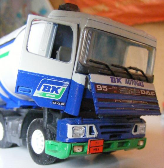 Modelvrachtwagen van een DAF 95 door Tekno